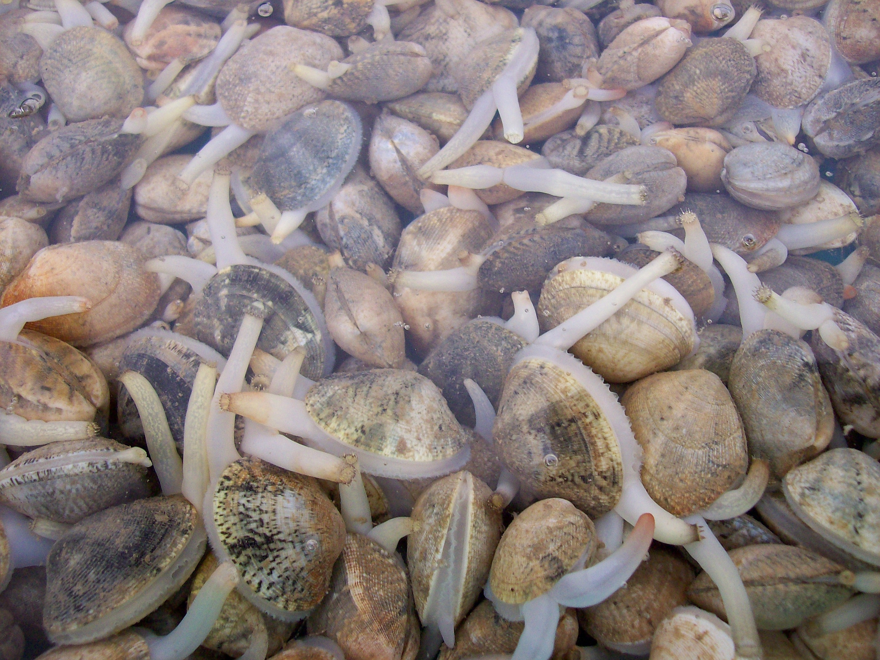 Bivalvia, Veneridae, muscheln mit Siphone (Nahaufnahme), aufgenommen Nähe Lissabon (Portugal)